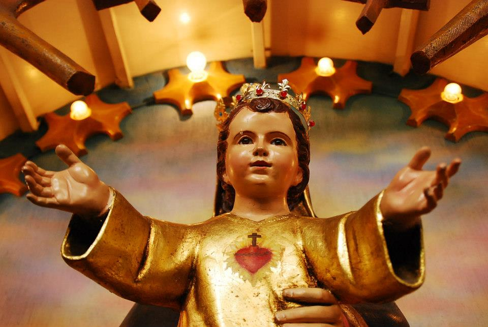 Imagen Frontal del Niño Jesús que carga Nuestra Señora de la Aurora